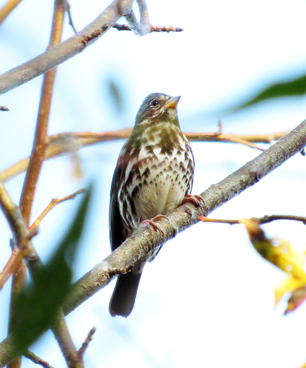 Passerella iliaca zaboria 1 dec 14 Conestee, SC